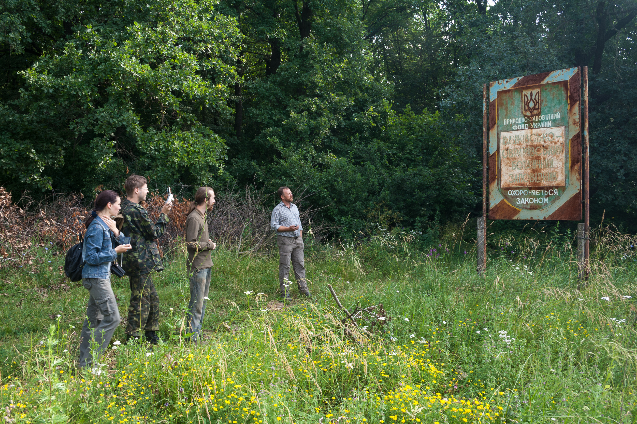 Ботанічний заказник «Оврамівсько-Івашківський»